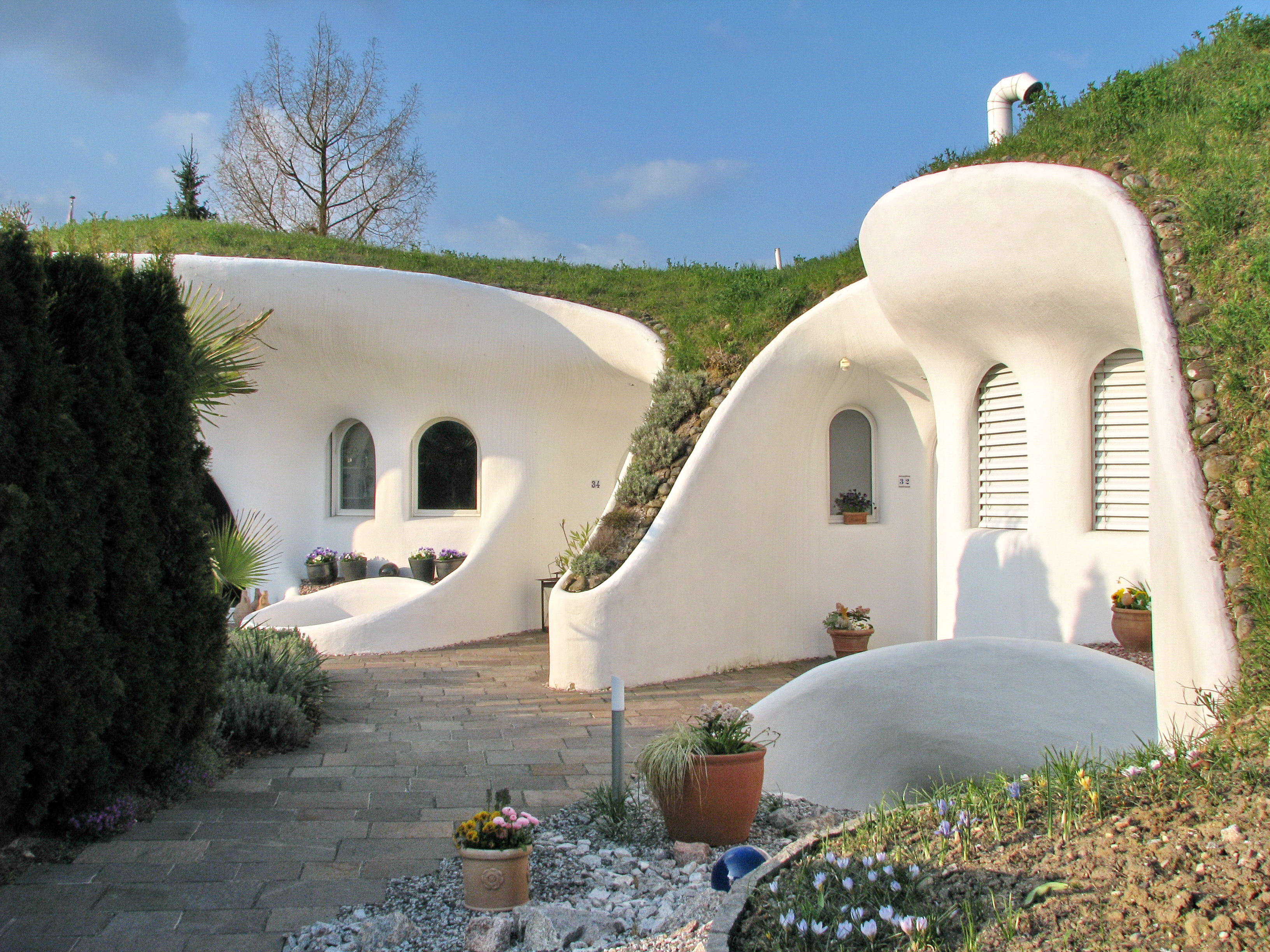 Earth house estate Lättenstrasse in Dietikon (Switzerland) by Peter Vetsch